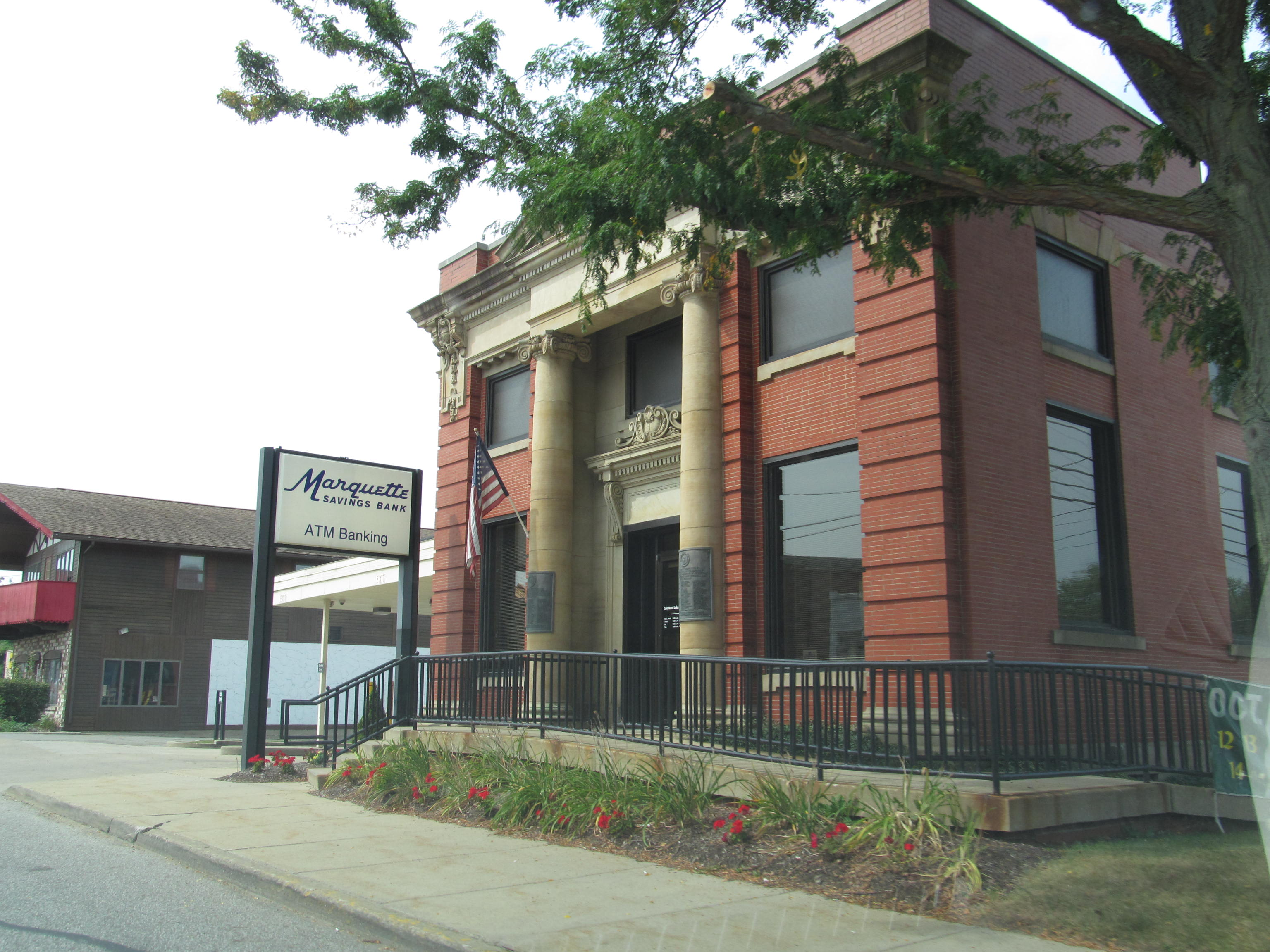 Conneaut Lake, Pennsylvania